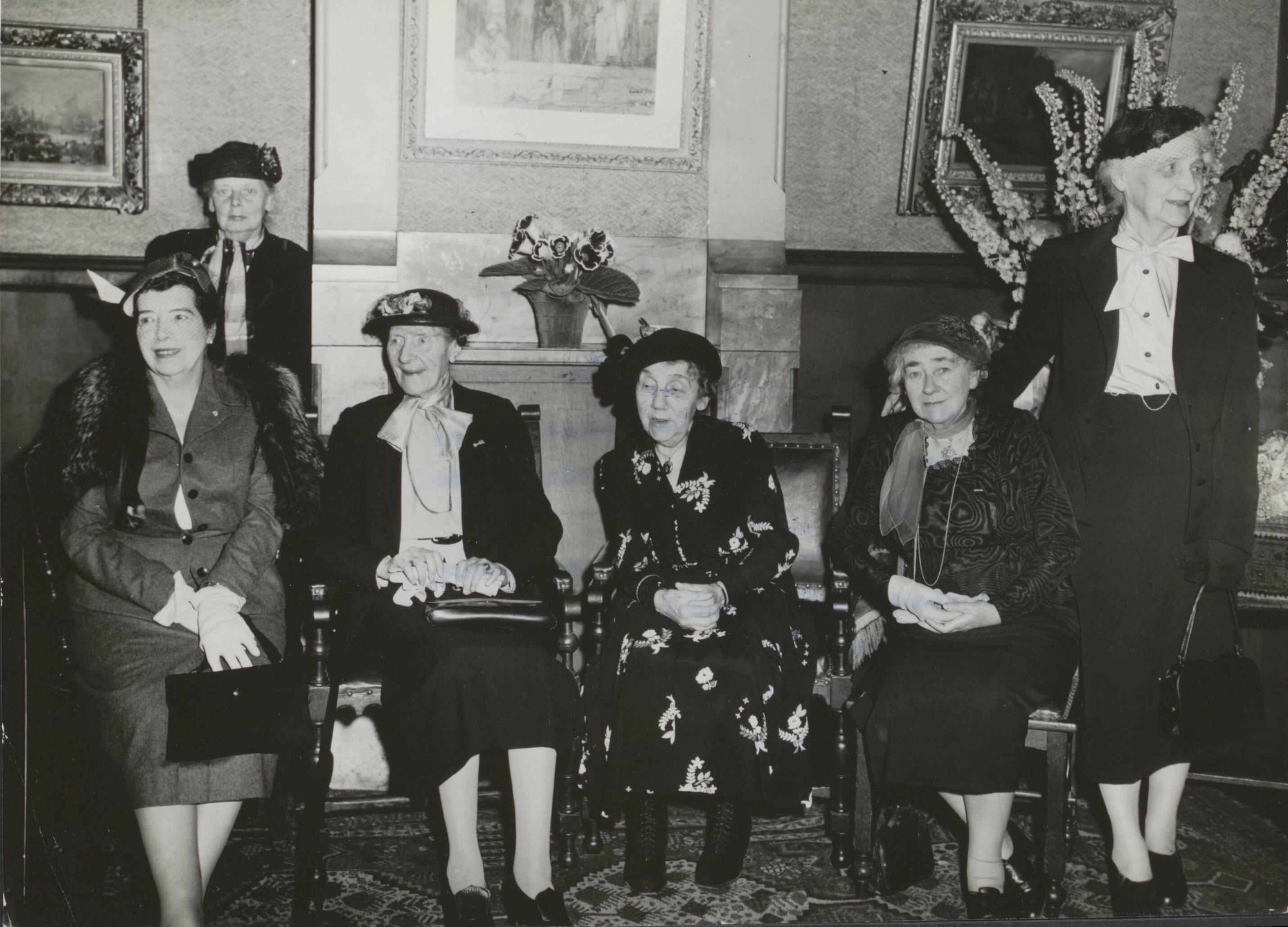 Collectie / Archief : Fotocollectie Elsevier Reportage / Serie : [ onbekend ] Beschrijving : Verjaardag van Coba Ritsema. Datum : 26 juni 1956 Locatie : Amsterdam, Noord-Holland Trefwoorden : huldigingen, kunstenaars, verjaardagen Persoonsnaam : Ansingh mw. Lizzy, Regteren Altena mw. Marie. v., Ritsema mw. Coba., Surie mw. Jacoba, Westendorp-Osieck mw. Betsy Fotograaf : Fotograaf Onbekend / Anefo Auteursrechthebbende : Nationaal Archief Materiaalsoort : Foto (zwart/wit) Nummer archiefinventaris : bekijk toegang 2.24.05.02 Bestanddeelnummer : 092-0790 Reacties Geplaatst door Maaike op 23 maart 2013 - 14:51. Zij maakten deel uit van de Amsterdamse Joffers